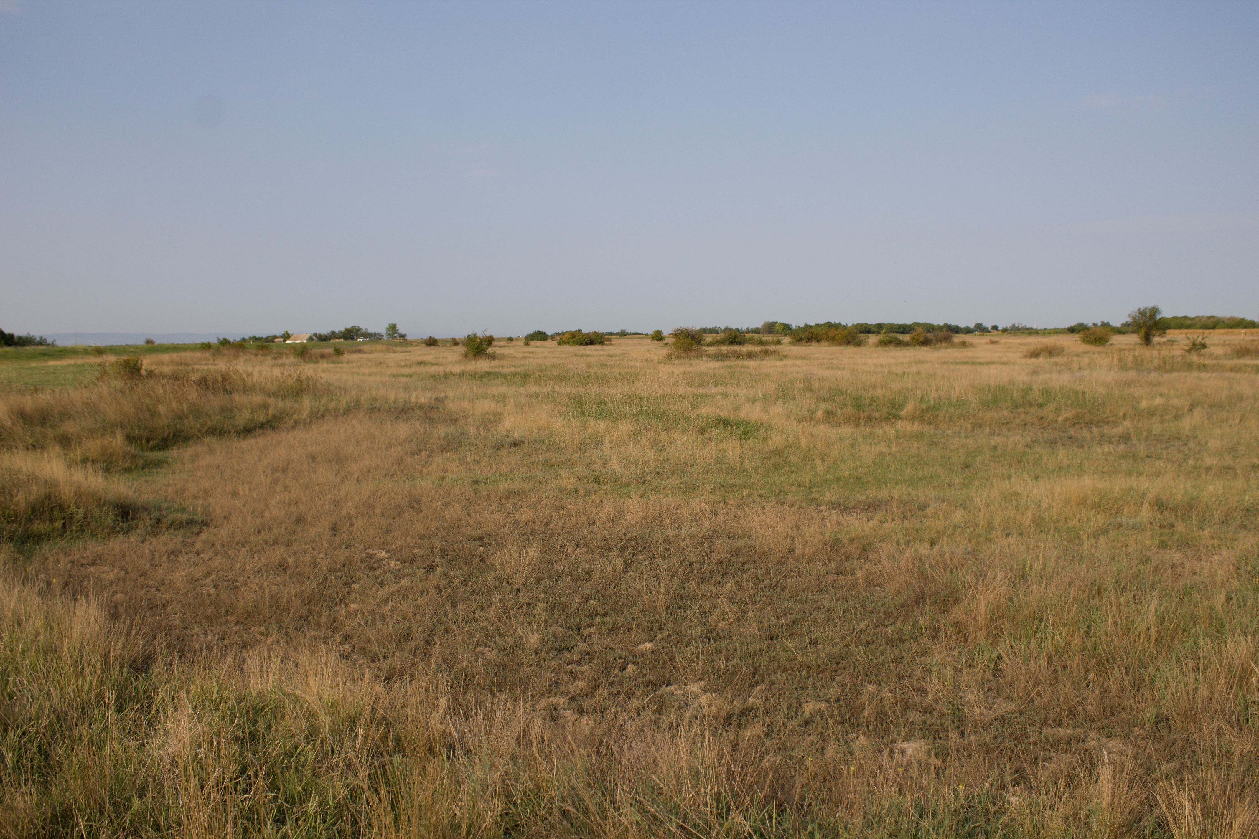 Slatinsko stanište u okolini Žablja